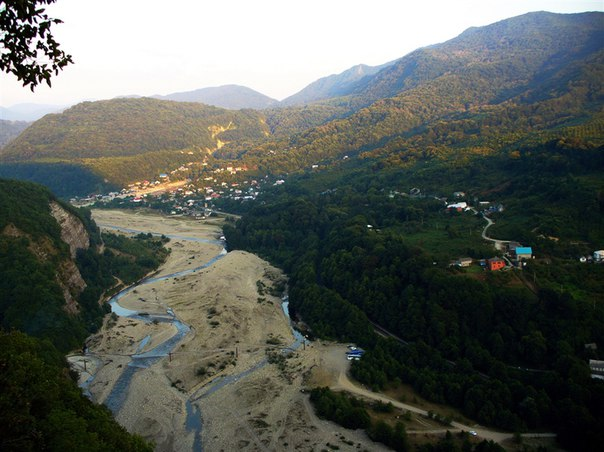 Вид на аул Калеж